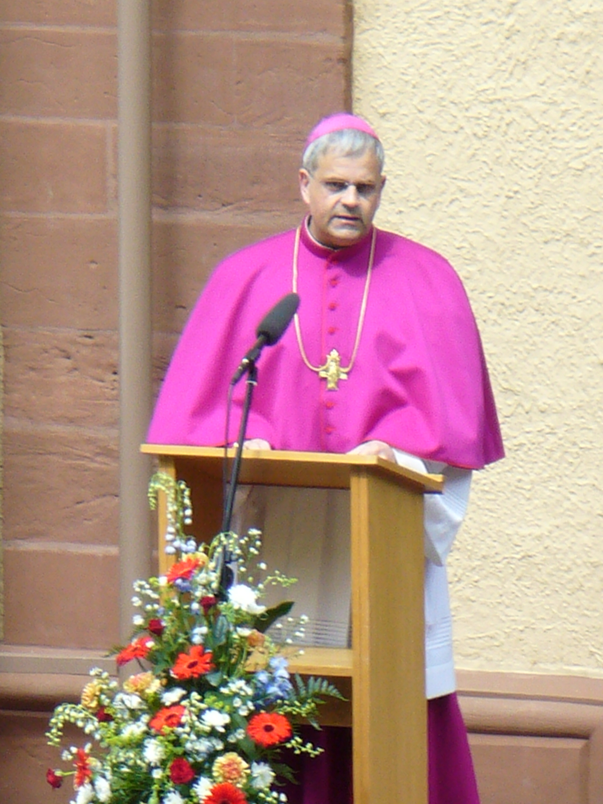 Weihbischof Reinhard Hauke bei der 51. Männerwallfahrt zum Klüschen HagisAuxiliary Bishop Reinhard Hauke at the Pilgrimage of Men to Klüschen Hagis